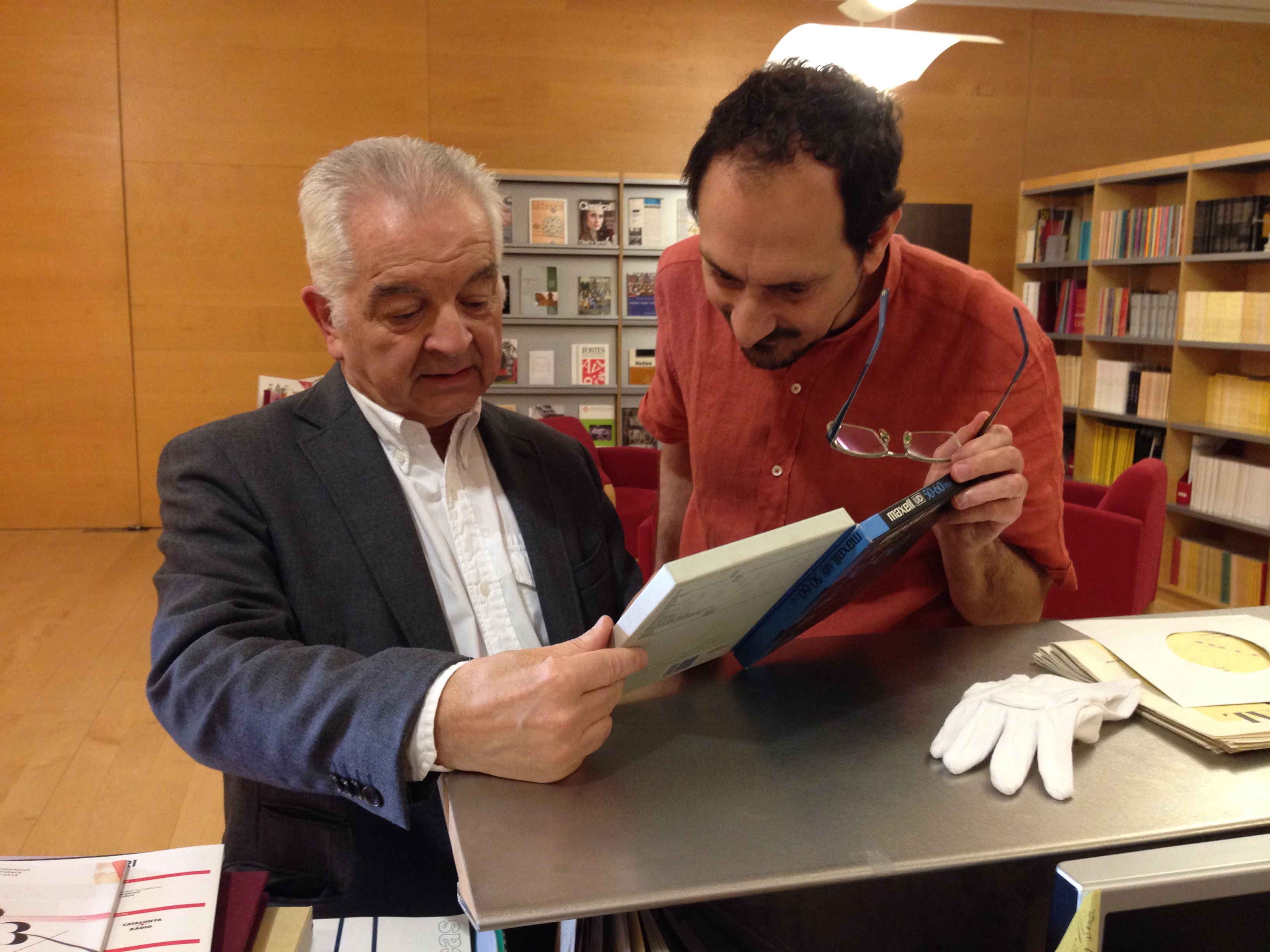 Borja de Riquer i Jaume Ayats al Museu de la Música de Barcelona